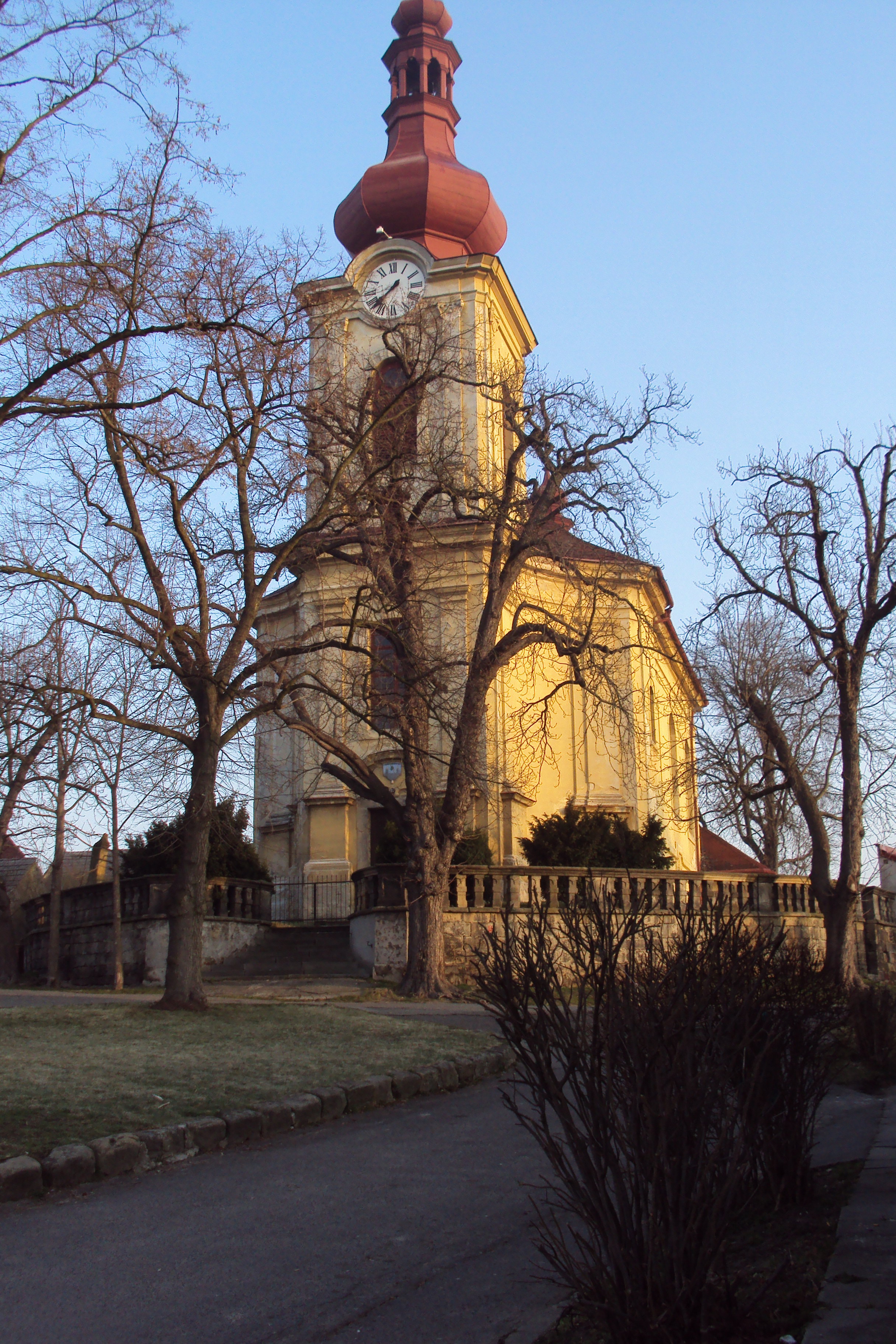 Kostel sv.Maří Magdaleny v Holanech na Českolipsku